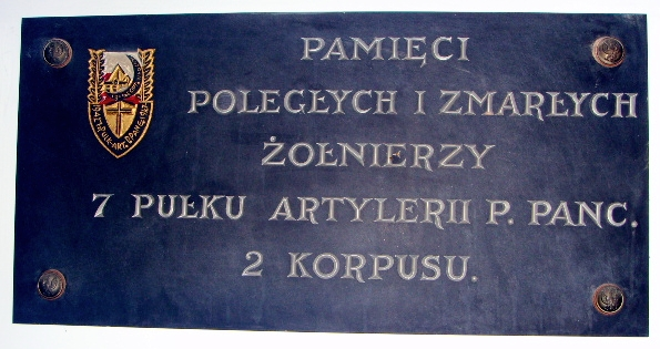 Tablica w kościele św. Andrzeja Boboli w Londynie